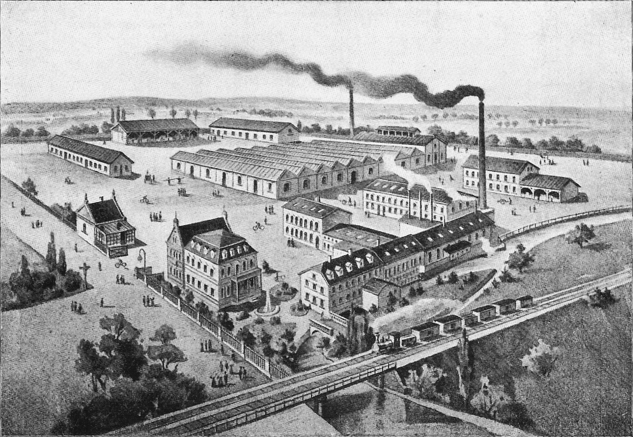 NSU Motorenwerke (1900) Neckarsulm/Germany